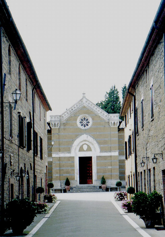 Cappella di Santa Maria a Montorio (GR), foto da apparecchio non digitale del 27/08/2005